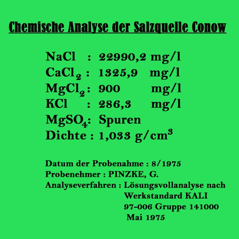 chem. Zusammensetzung